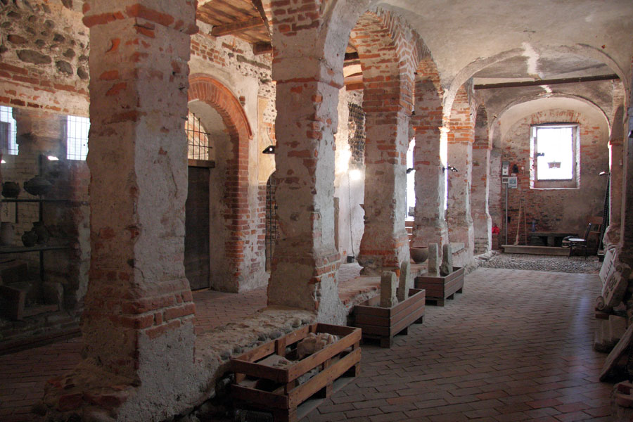 Il doppio porticato di accesso alla Cantina dei Santi di Romagnano Sesia (NO)